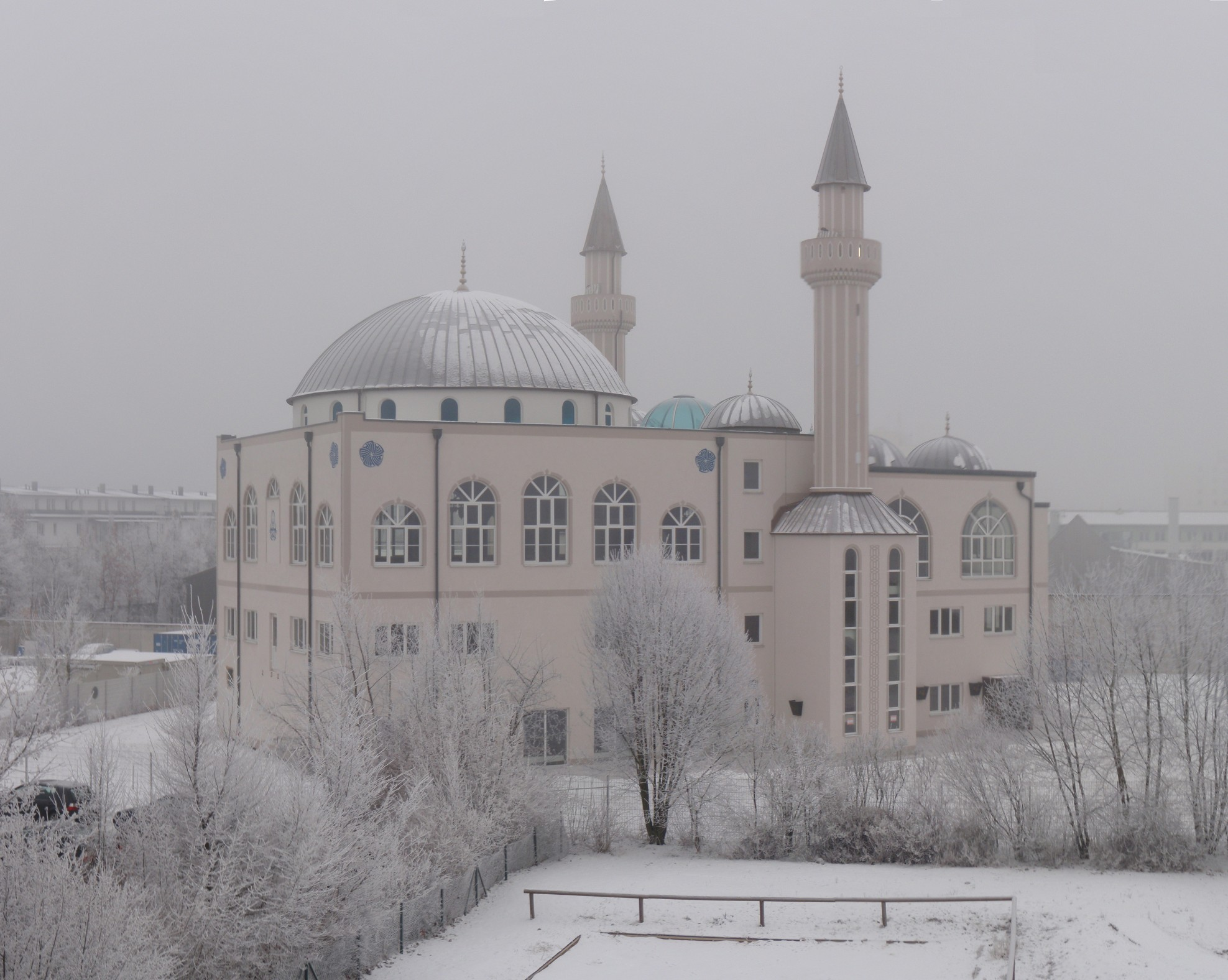 Kocatepe-Moschee Ingolstadt mit Schnee, aufgenommen am 16.1.2009 vom alten Temic-Gebäude (Ringlerstr. 19)